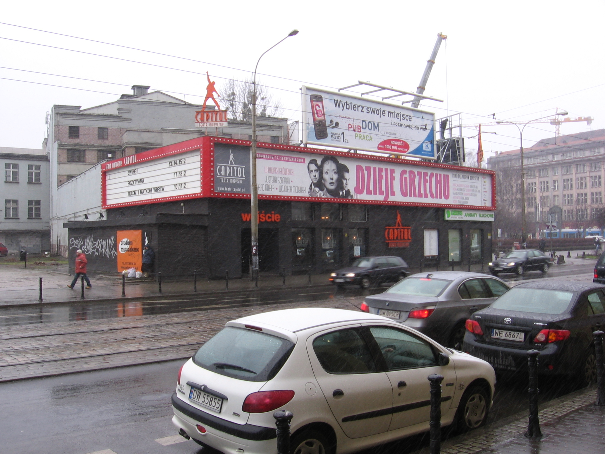 user:Julo This work has been released into the public domain by its author, Julo. This applies worldwide. In some countries this may not be legally possible; if so: Julo grants anyone the right to use this work for any purpose, without any conditions, unless such conditions are required by law.